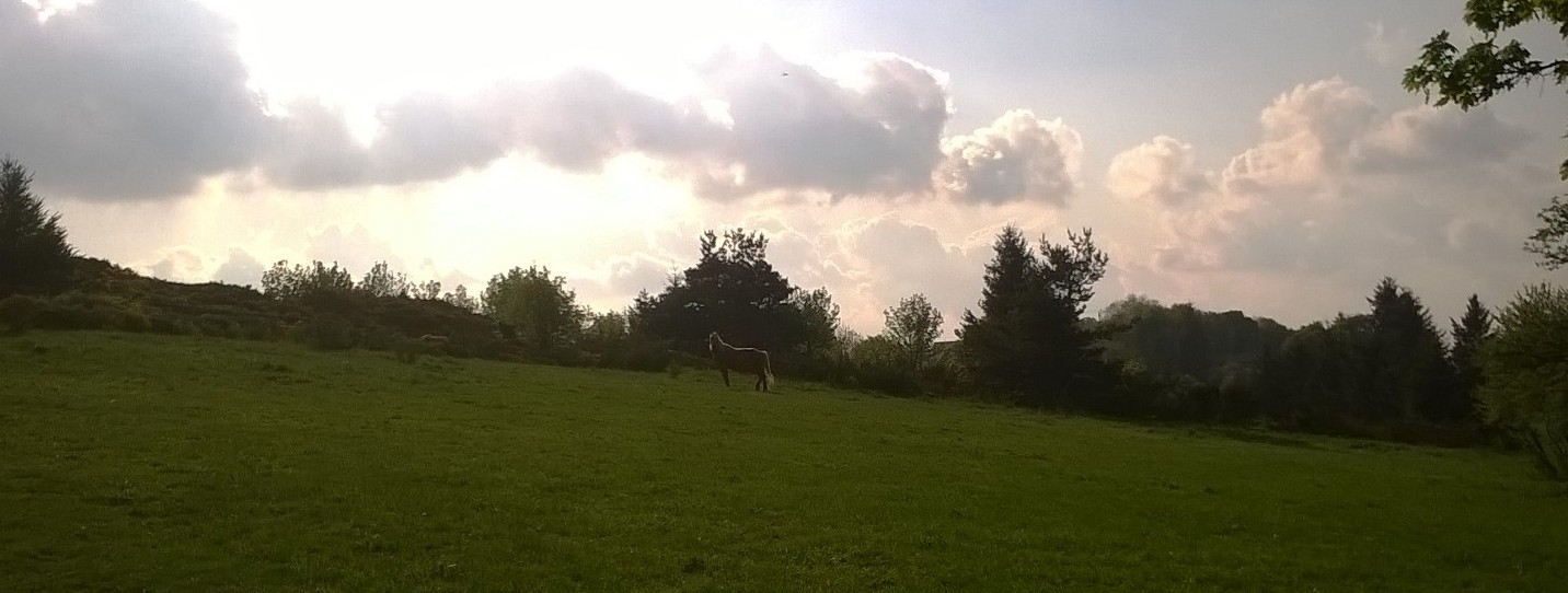 montregard7